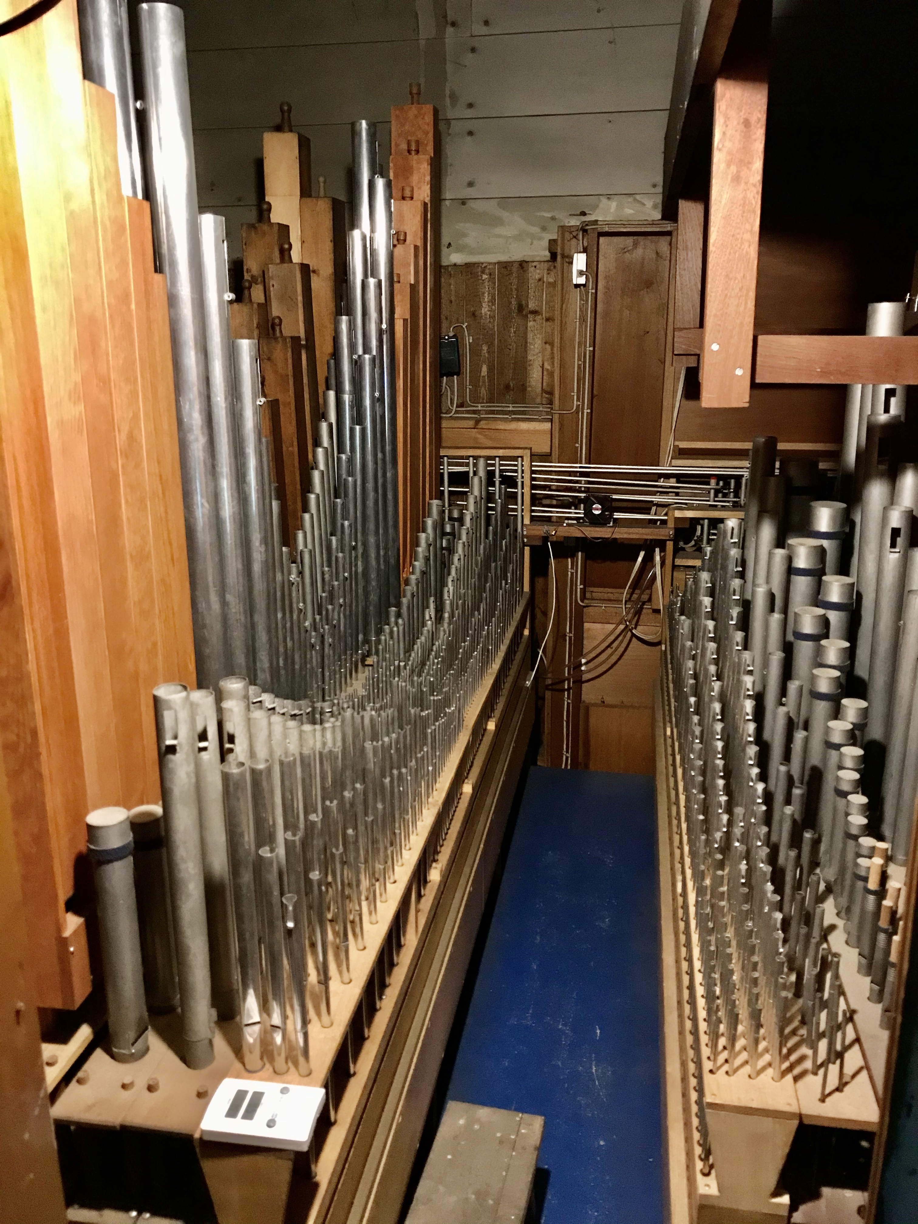 St. Laurentius Süderhastedt, Landkreis Dithmarschen, Schleswig-Holstein, Deutschland